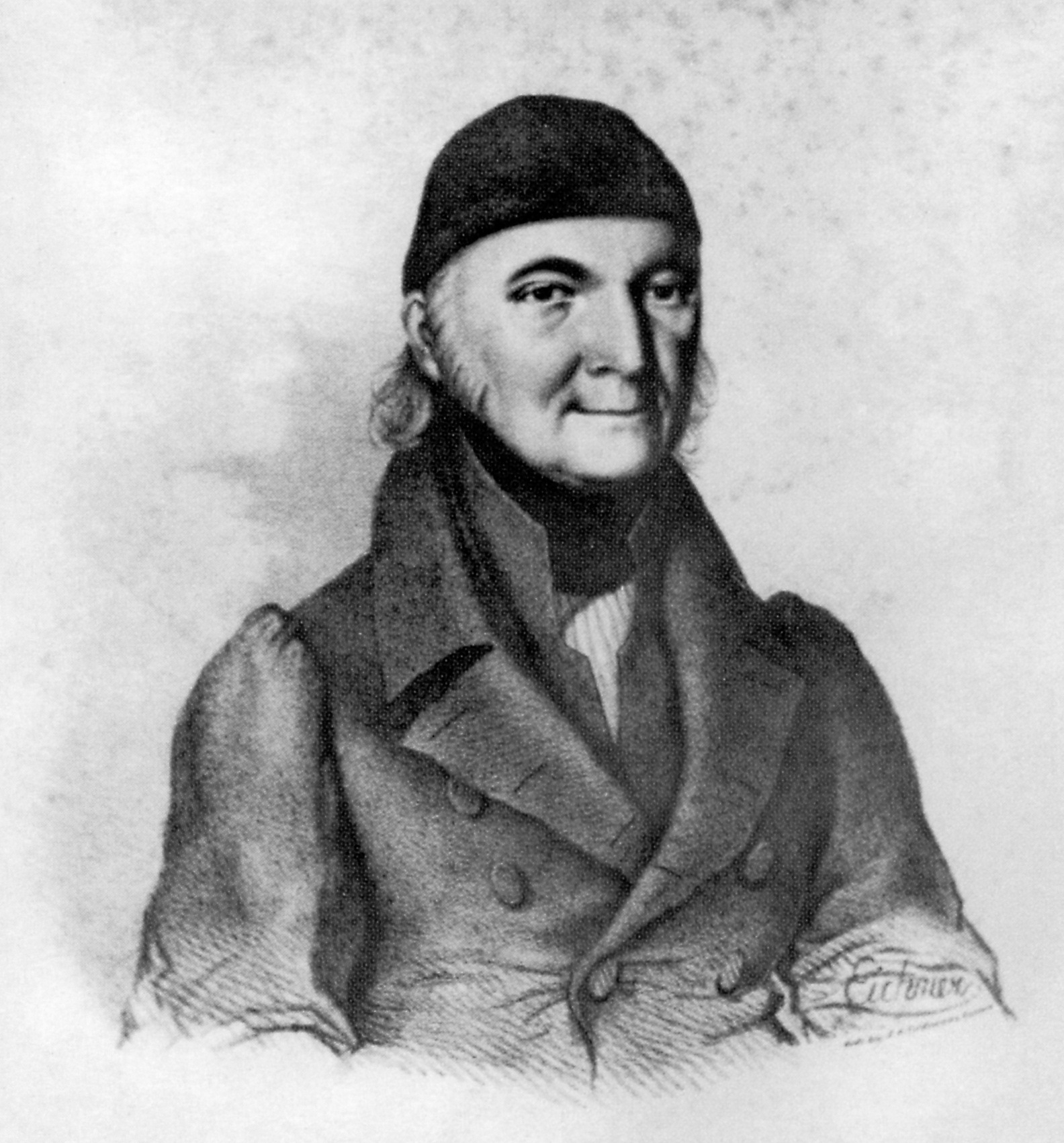 Heinrich Gustav Flörke (1764-1835), Professor der Naturgeschichte und Botanik in Rostock.